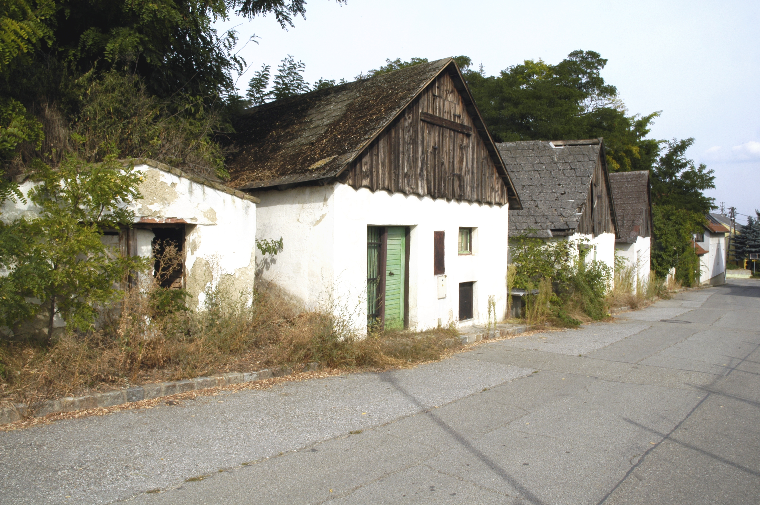 Kellergasse Wolkersdorfer Straße in Bockfließ